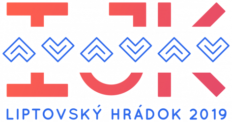 Emblemo de IJK 2019